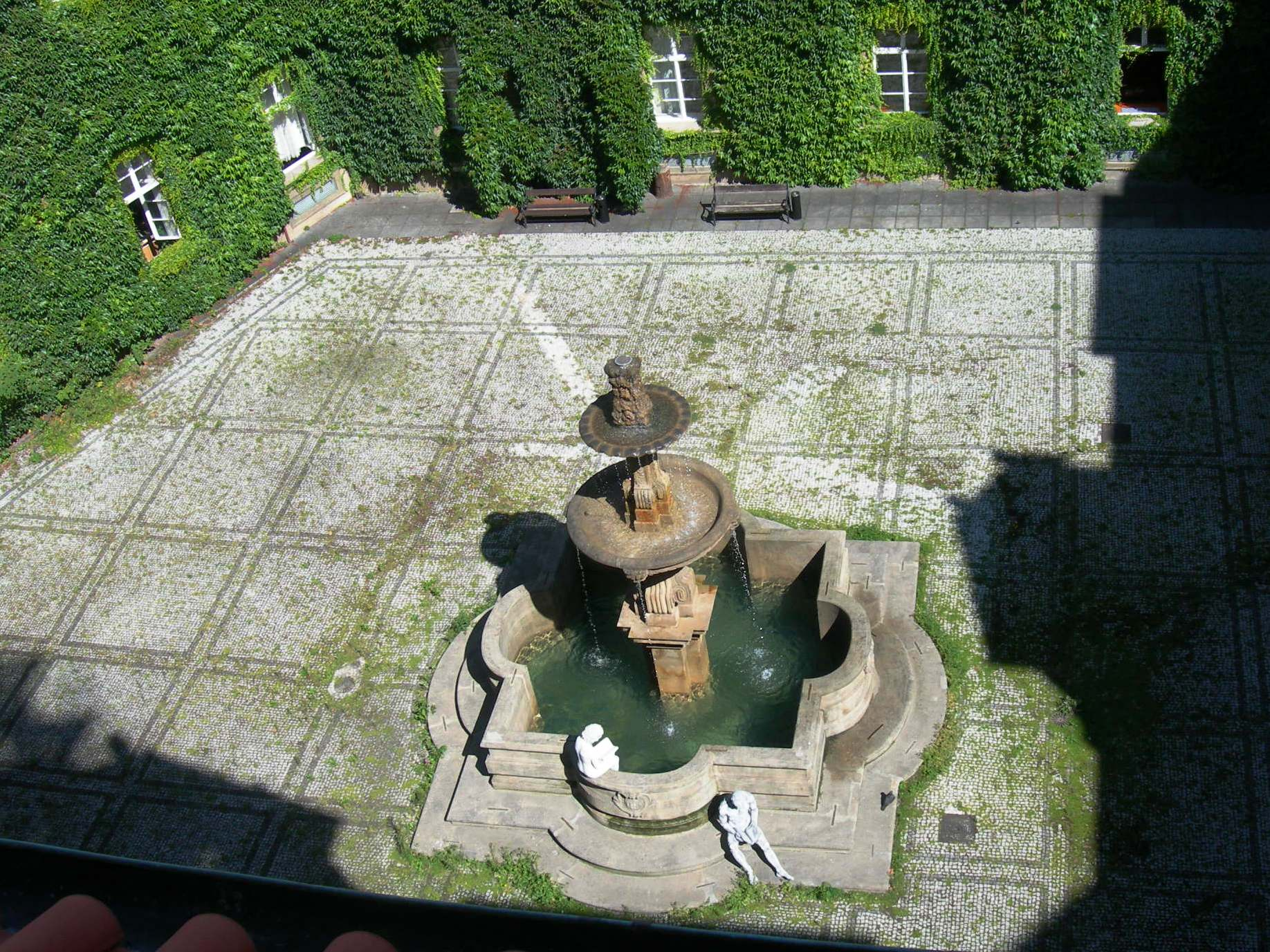 Klementinum, courtyard.)